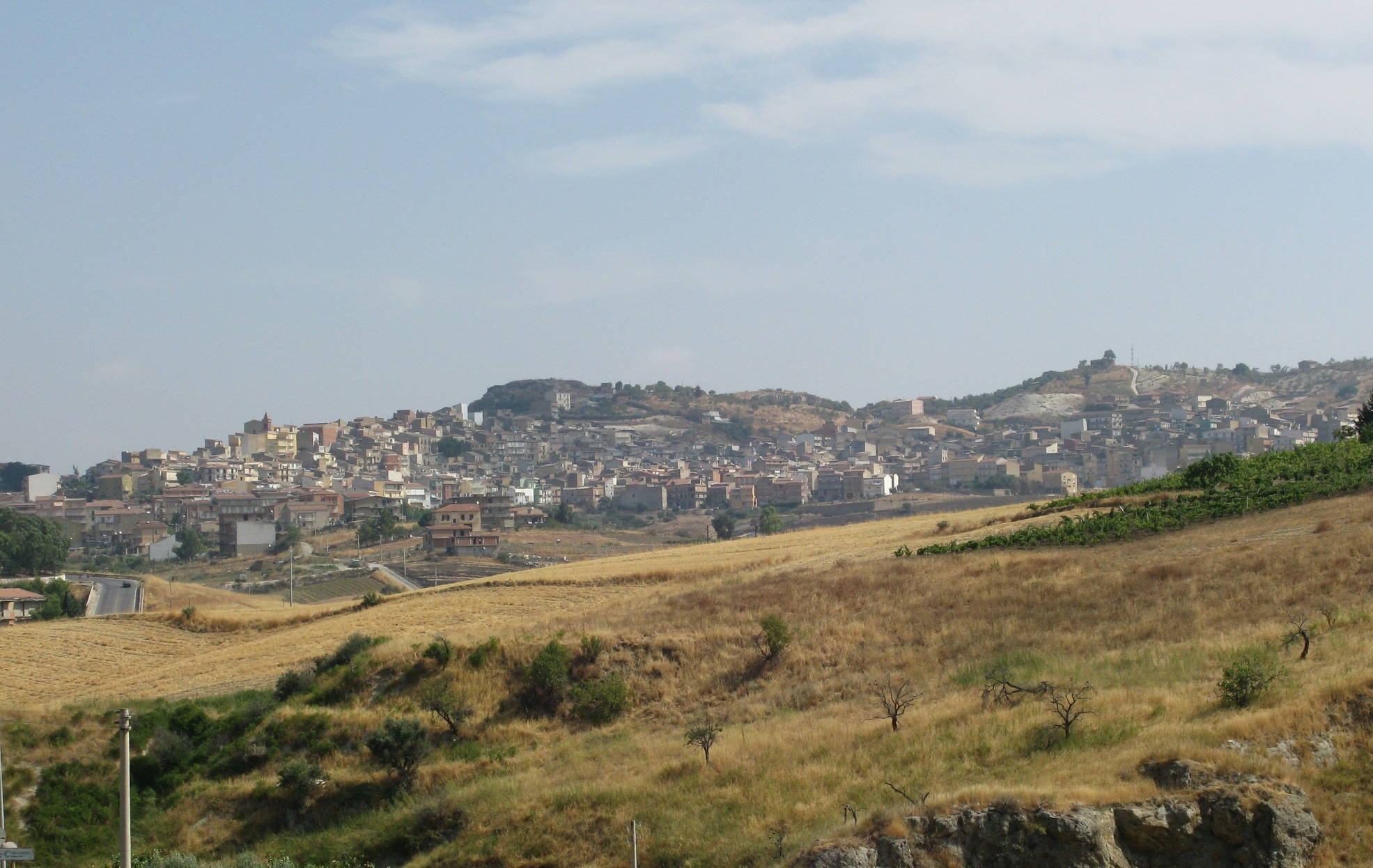 Panorama di Santa Elisabetta.